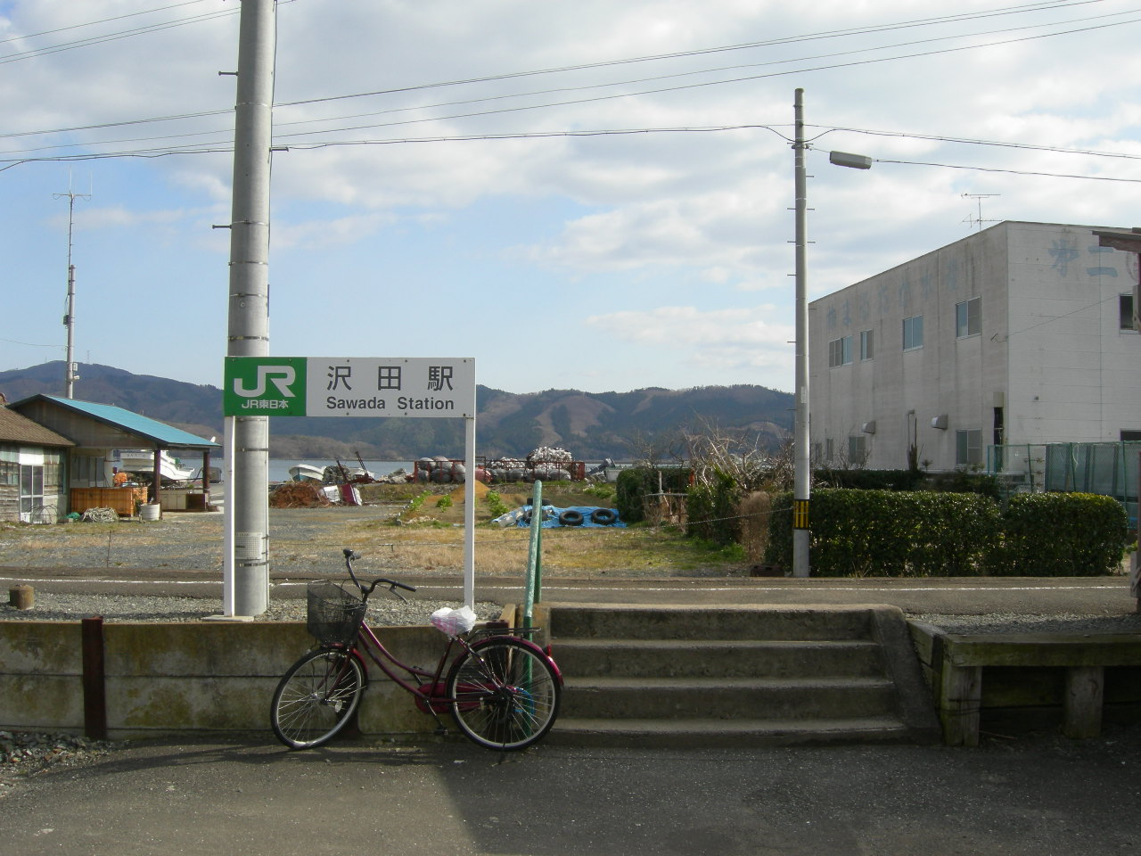 JR石巻線（JR Ishinomaki line）沢田駅（Sawada station）